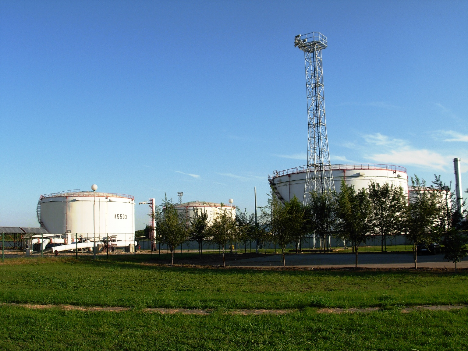 Rafinerija u Novom Sadu.